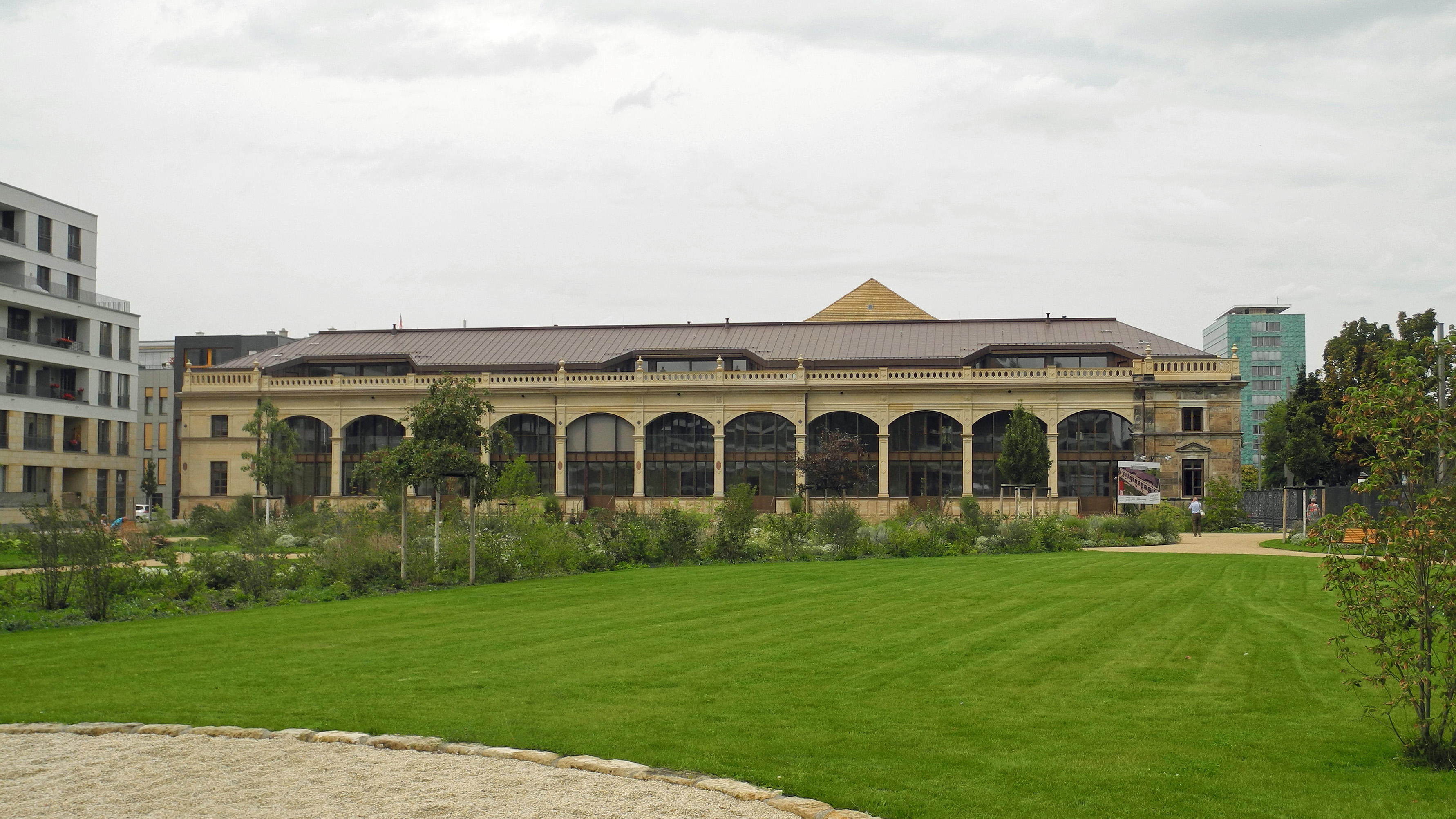 Das ehem. Orangeriegebäude in Dresden, An der Herzogin Garten, wurde neu aufgebaut und ist jetzt ein Wohnhaus. Die Gartenanlage an der Orangerie „Der Herzogin Garten“ in Dresden an der Ostra-Allee wurde ab August 2019 der Öffentlichkeit während der Tageszeit zugänglich gemacht.